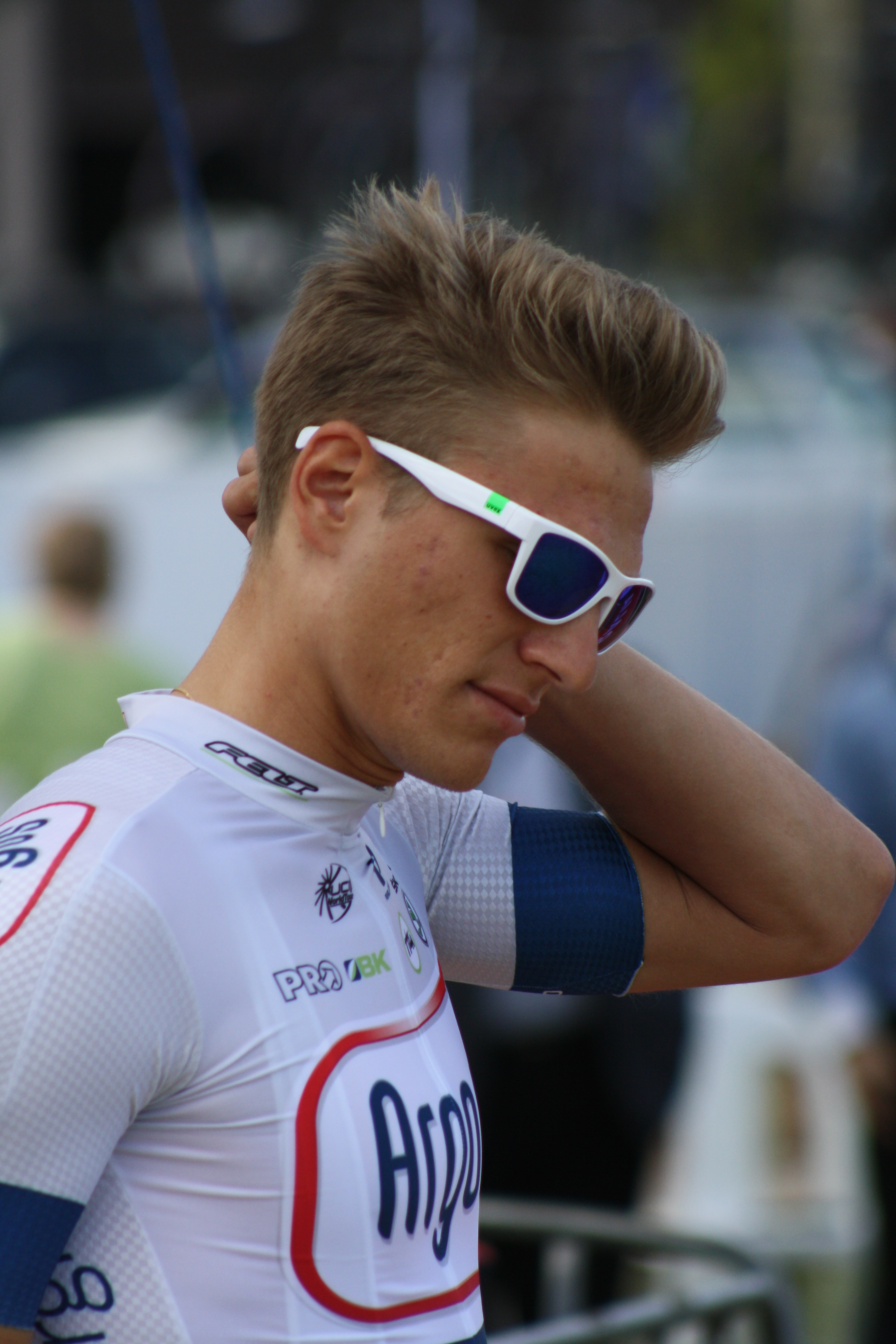 Marcel Kittel